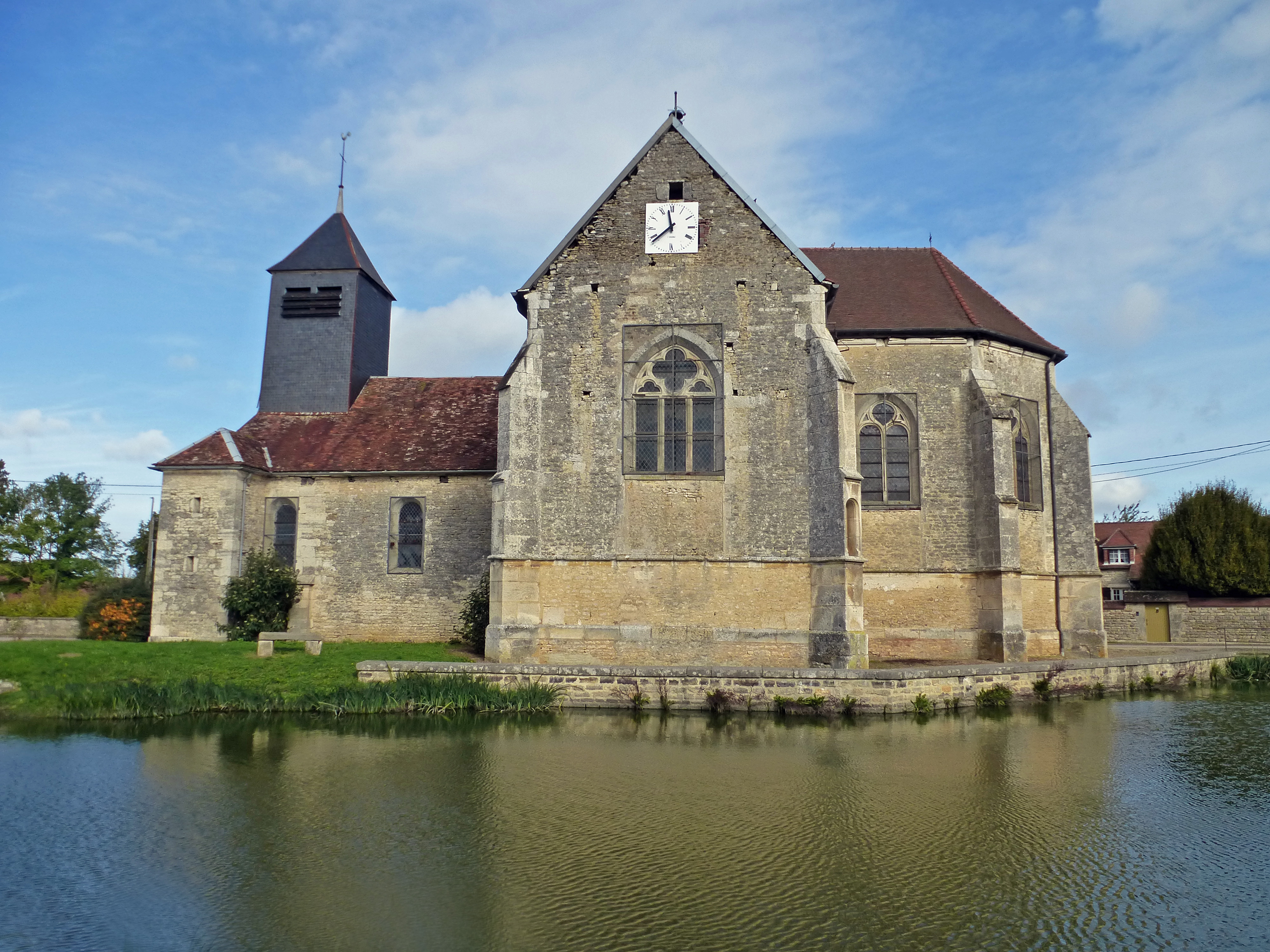 L'église (16-19eme siècle) baigne dans une mare